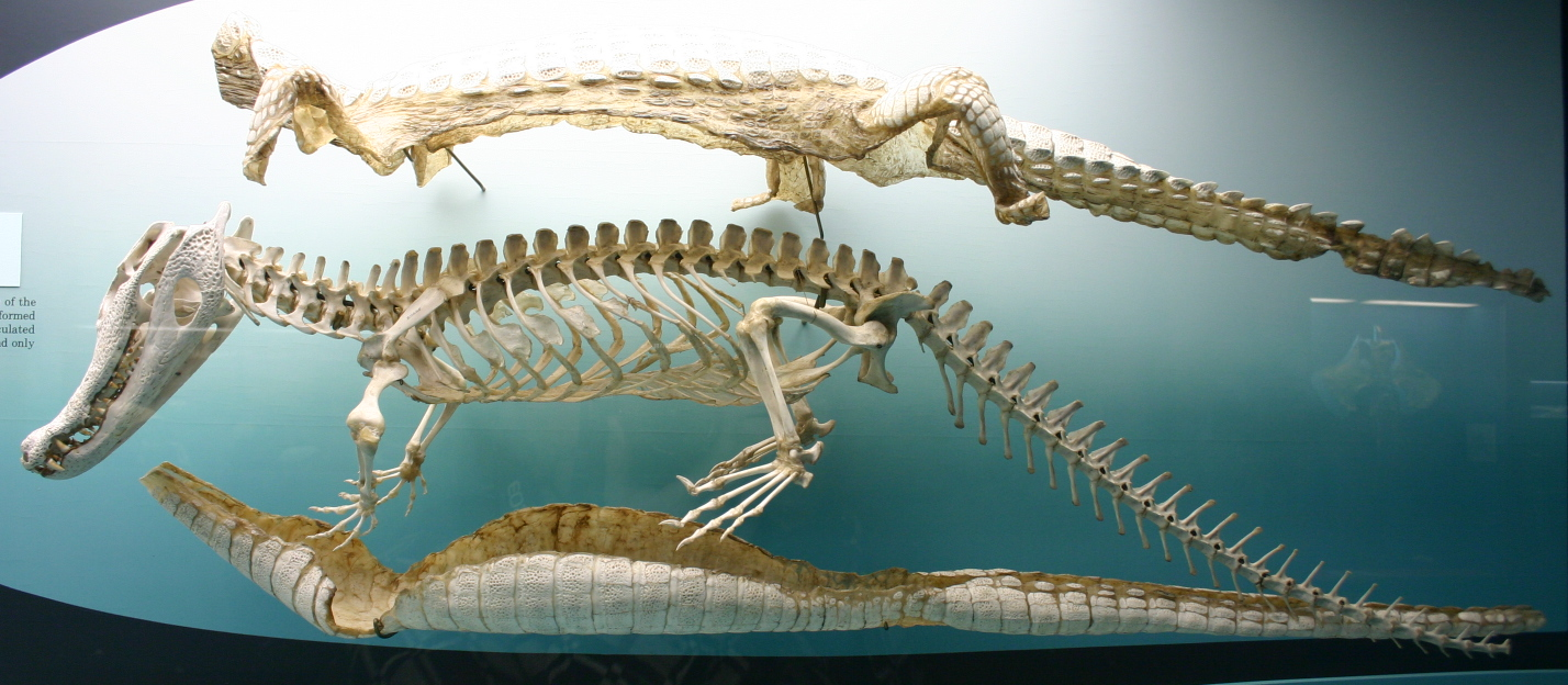 Melanosuchus niger Visit my blog at